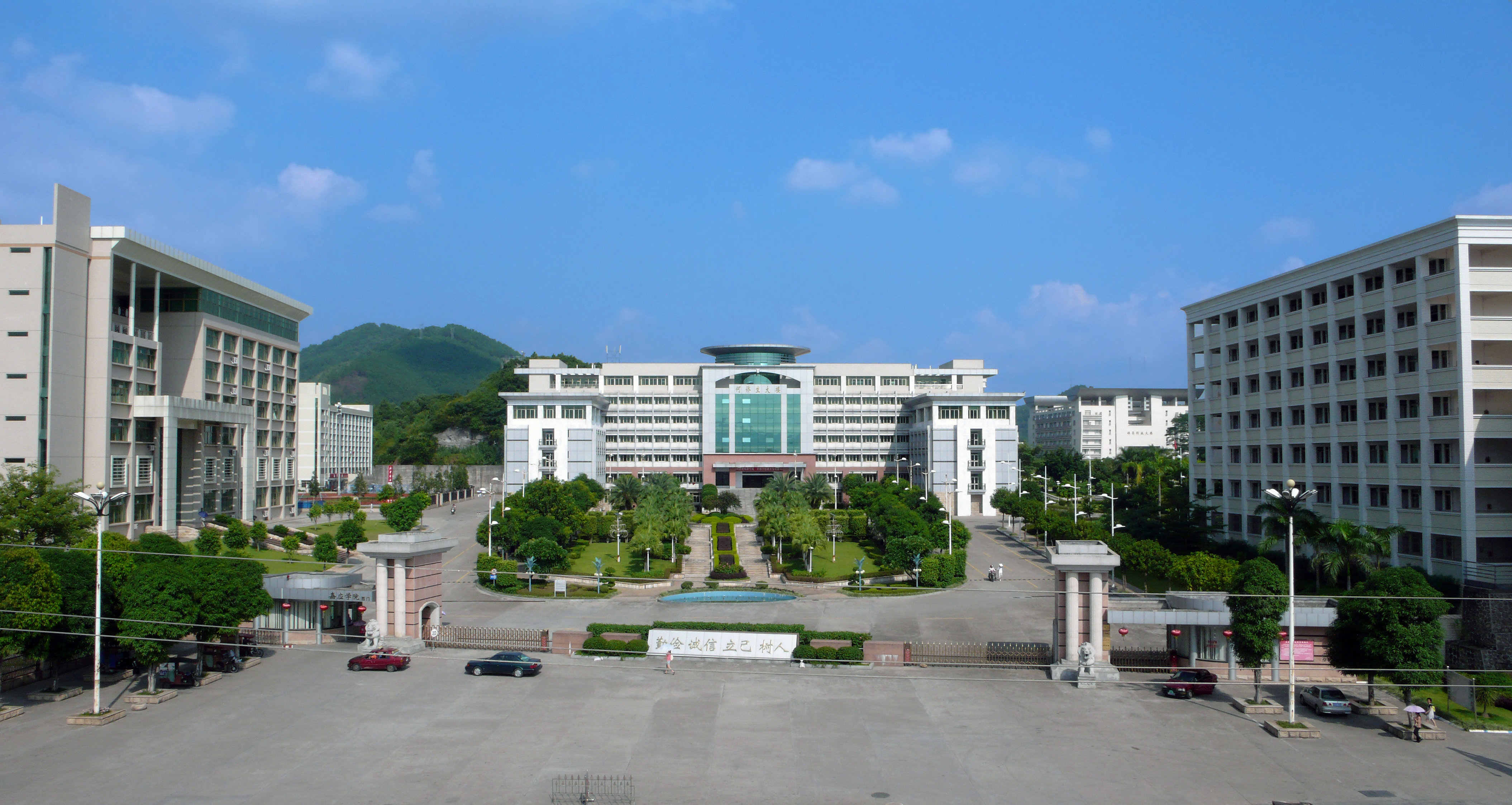 中人民共和国广东省梅州市嘉应学院正校门口